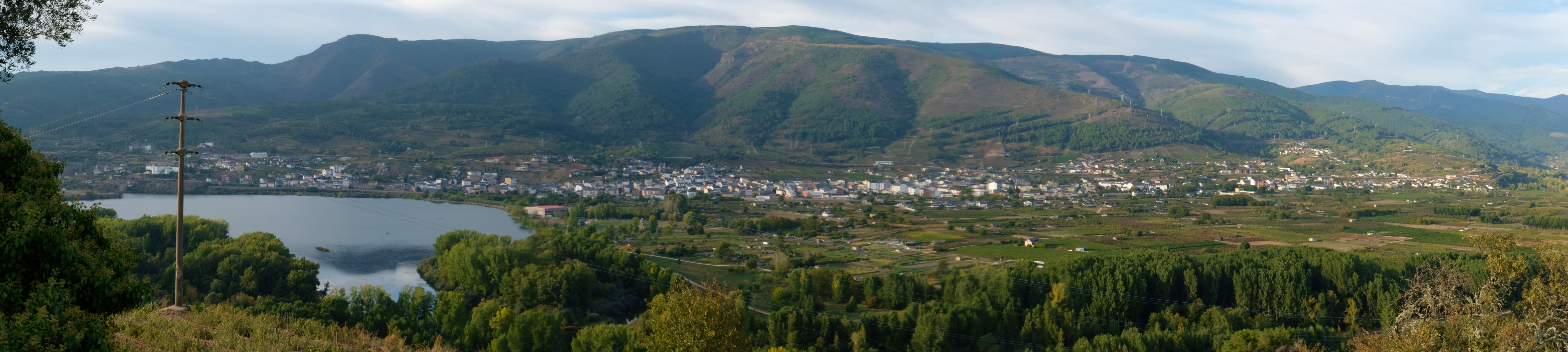 Panorámica dende Santa María con vistas á Rúa